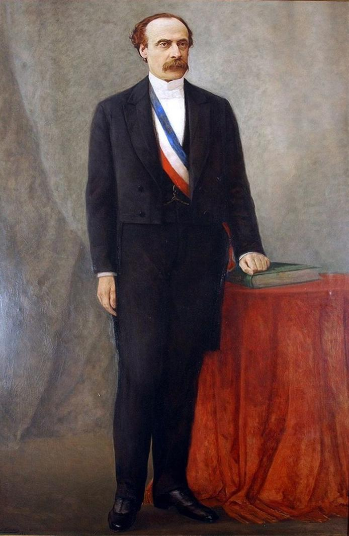 José Manuel Balmaceda Fernández (Hacienda Bucalemu; 19 de julio de 1840 - Santiago † 19 de septiembre de 1891) fue Presidente de Chile entre 1886 y 1891.